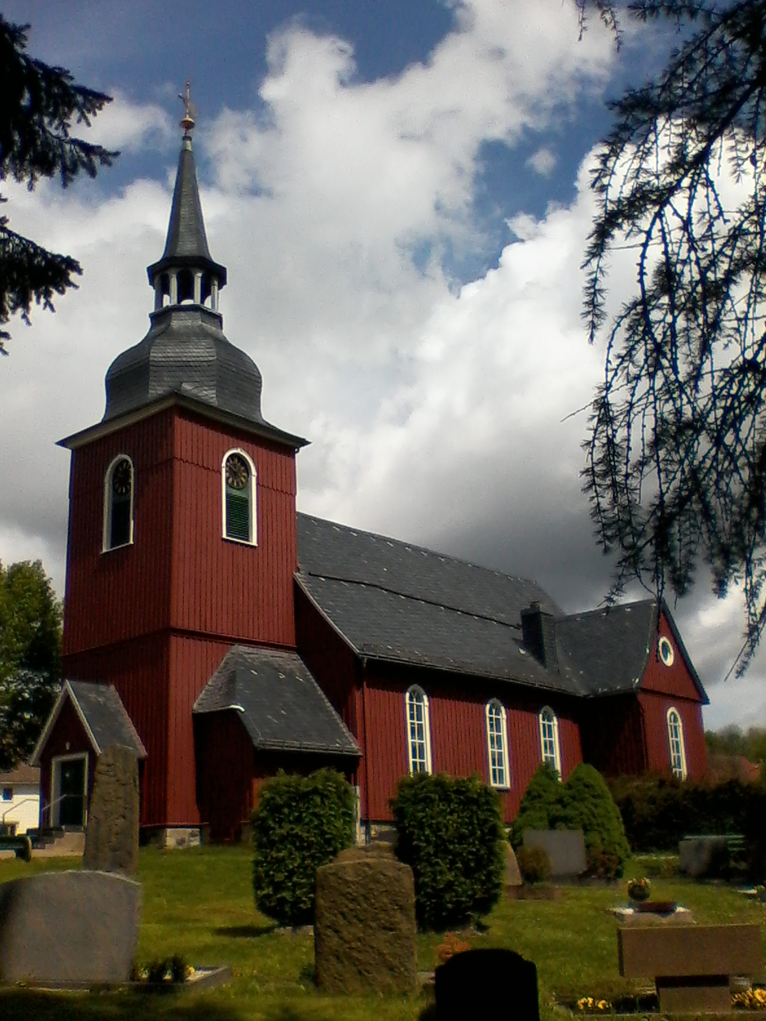 Ev.-luth. Kirche "Zur Himmelspforte" in Hohegeiß (Stadt Braunlage, Harz, Niedersachsen, Deutschland)